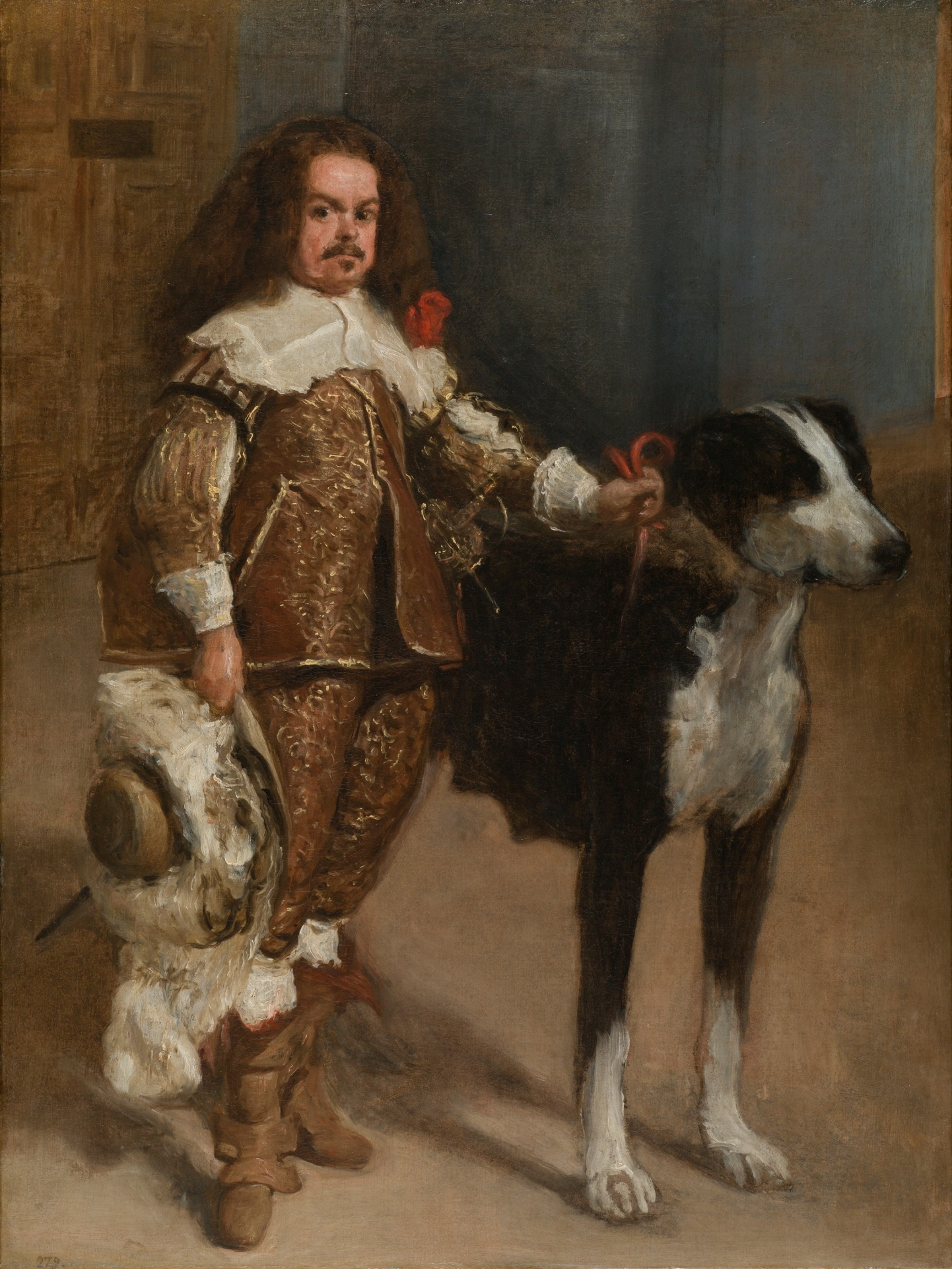 Retrato de un enano ataviado con ricas vestiduras y con espada.